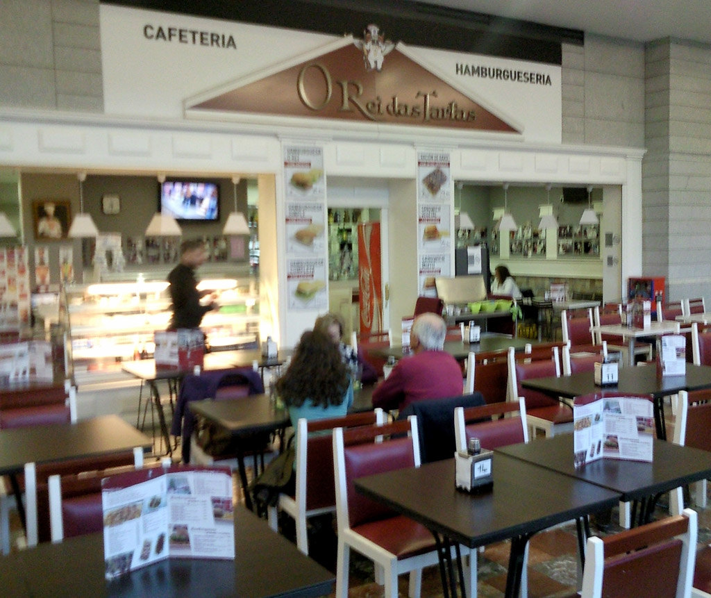 O Rei das Tartas no centro comercial Espacio da Coruña